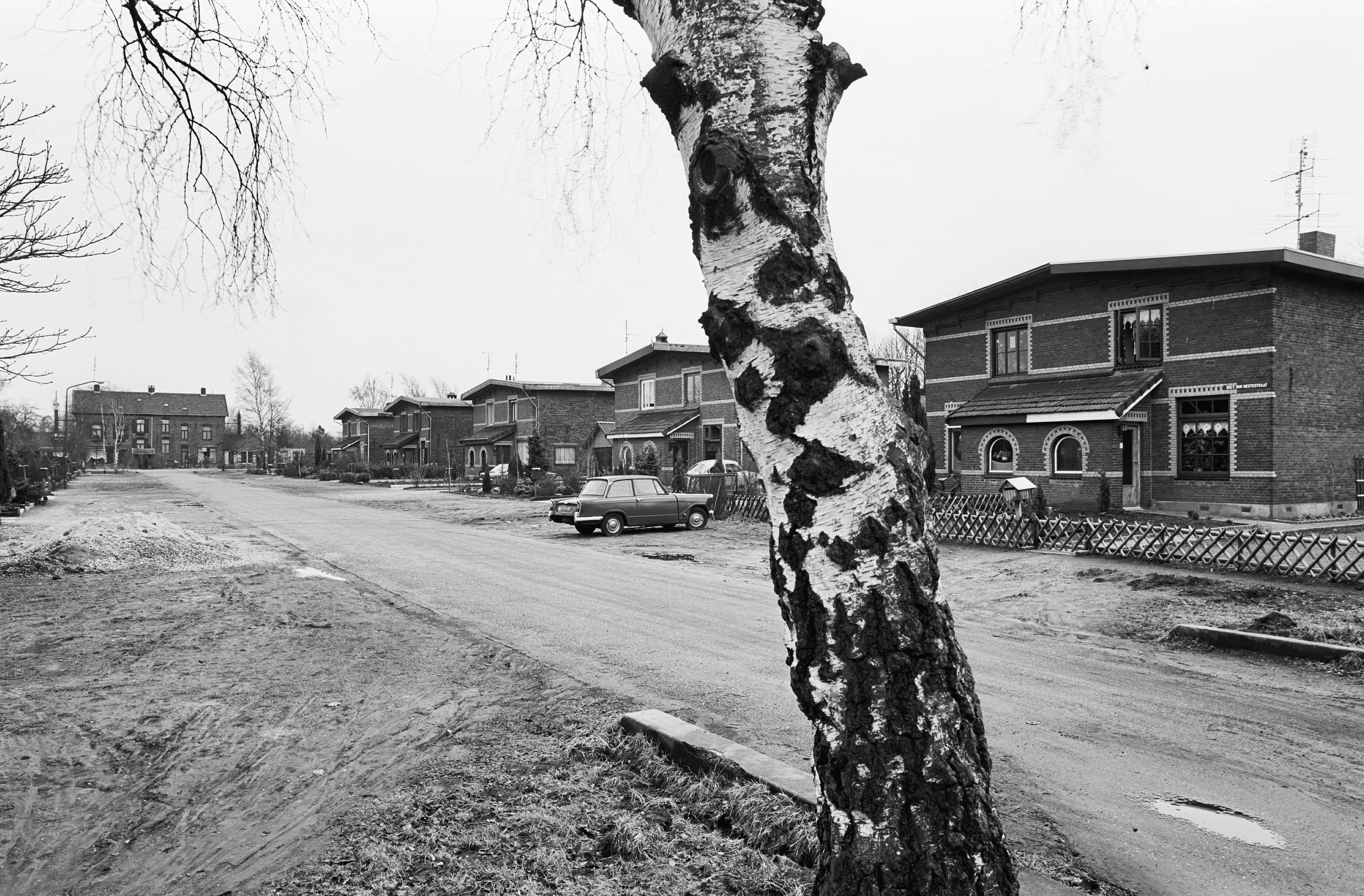 overzicht